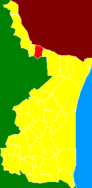 Localización Municipio de Camargo en Tamaulipas